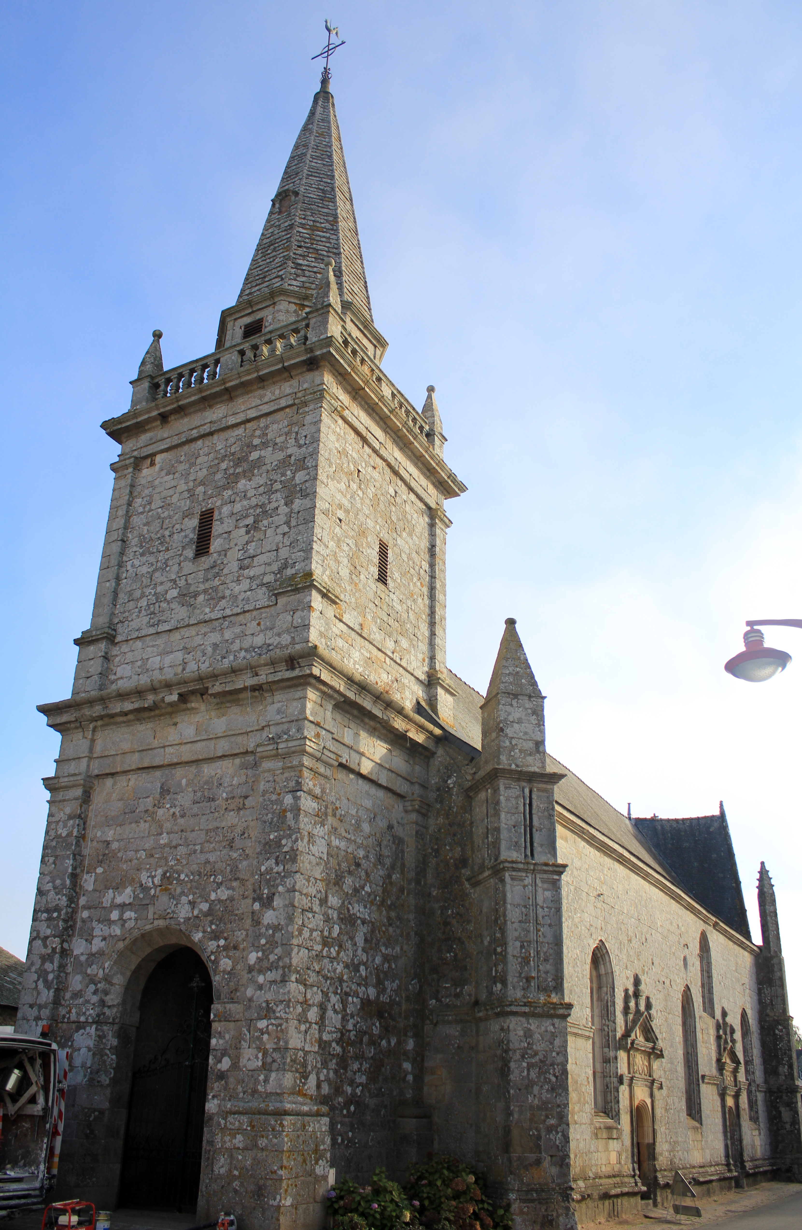 Église Notre-Dame-de-la-Fosse : vue générale